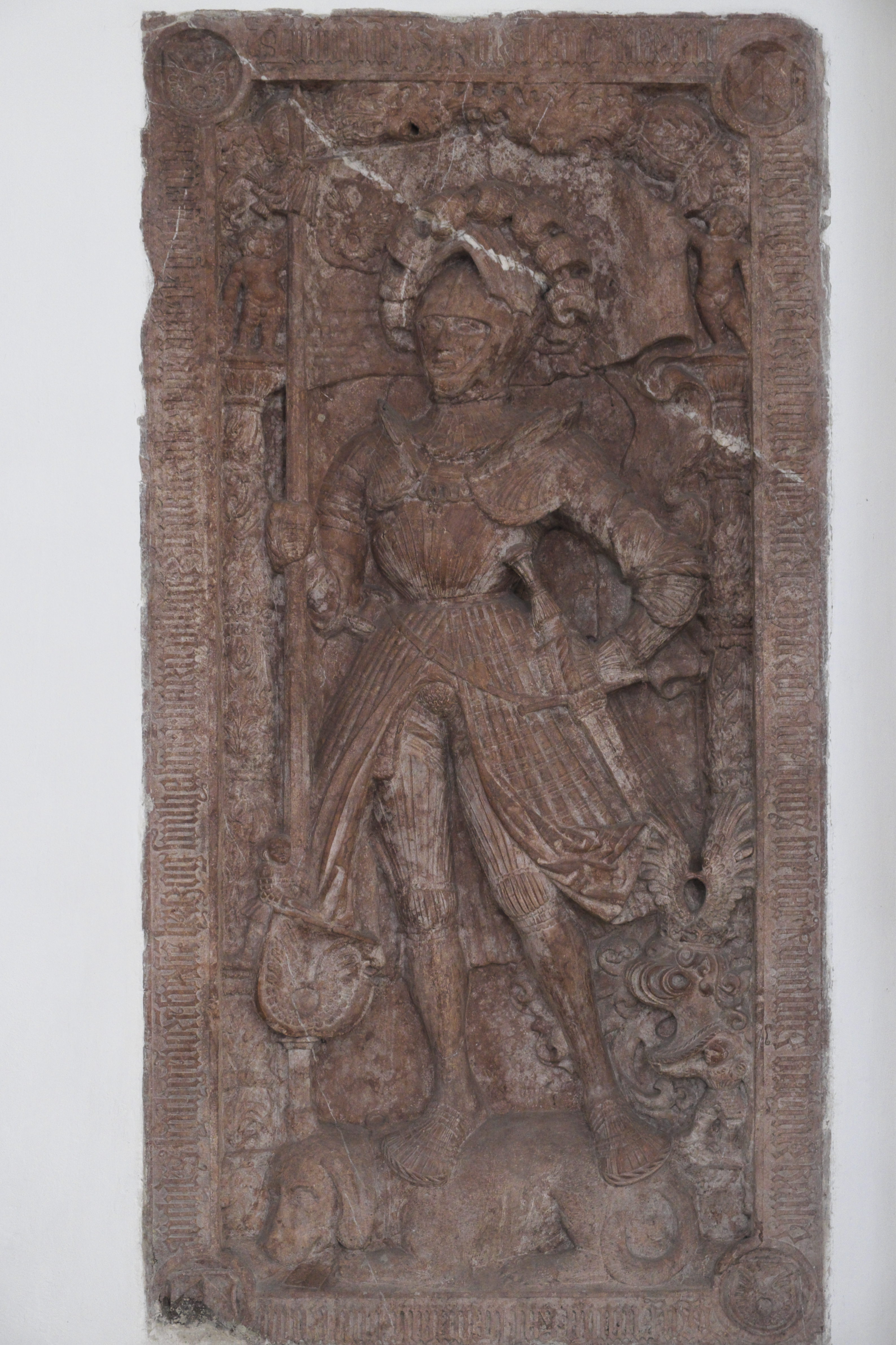 Katholische Pfarrkirche St. Jodok in Landshut (Bayern/Deutschland), Epitaph für Peter von Altenhaus († 1513)